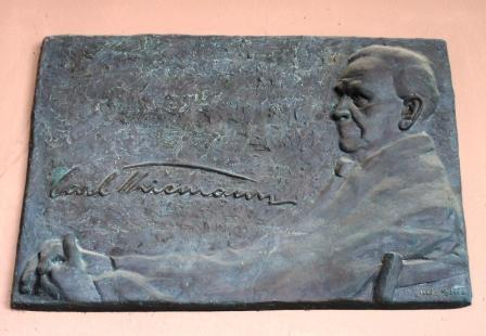 Carl Thiemann, Maler und Holzschneider, 1881-1966, Relief am Rathaus von Dachau, Bayern. Bildhauerin Ulla Scholl